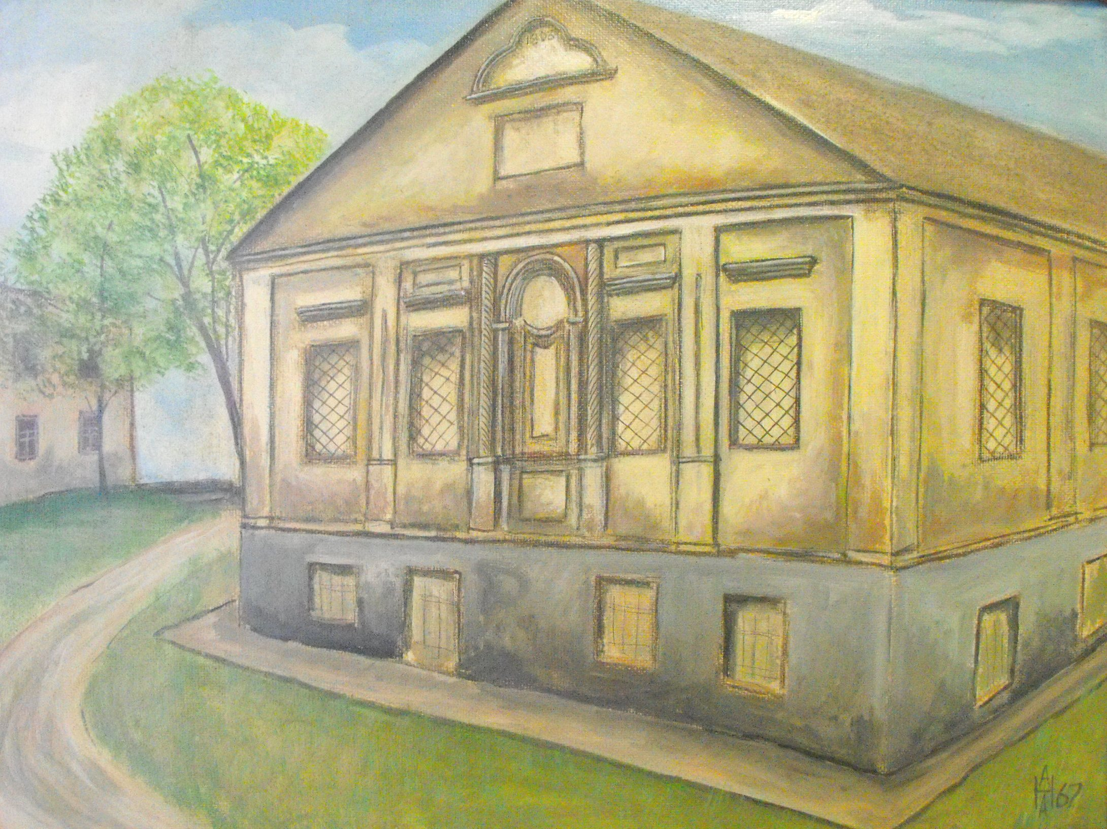 Воложин, иешива, 1967 год. Яичная темпера. Художник - Анатолий Наливаев.